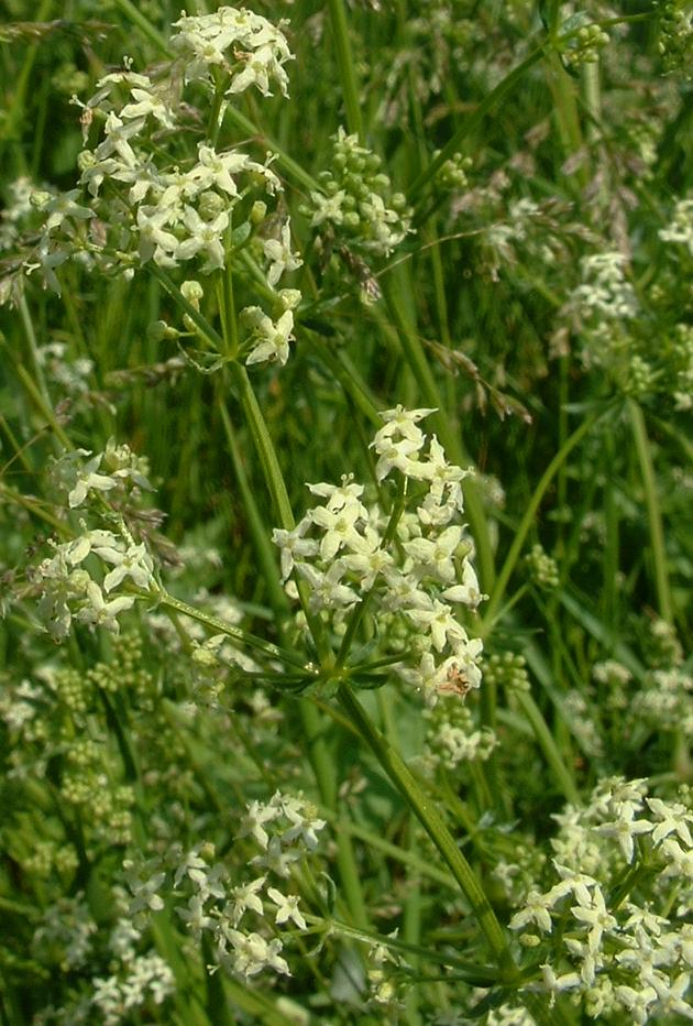 Galium album Caille-lait blanc, Vellefrey-et-Vellefrange